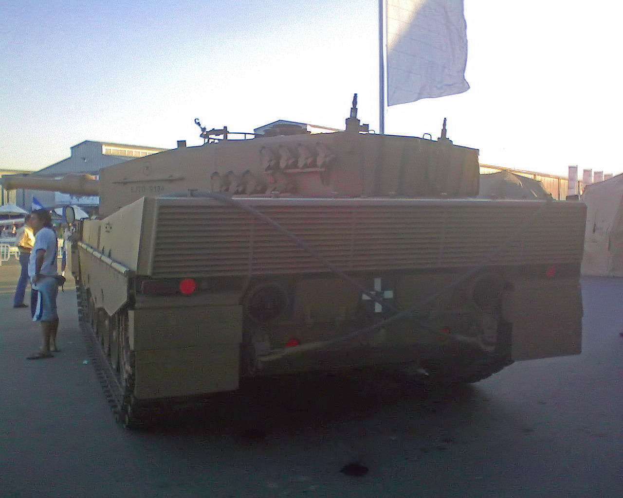 Tanque Leopard II del ejército de Chile